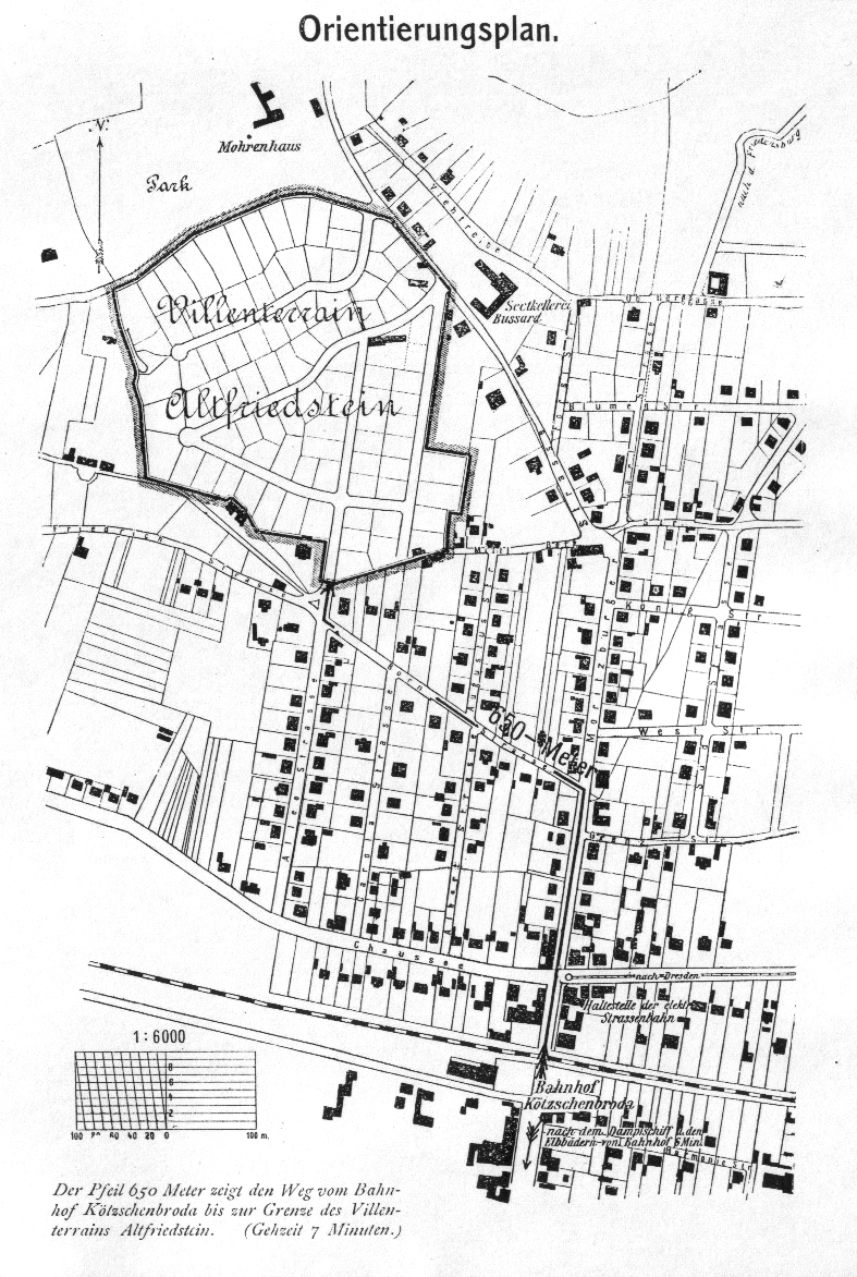 Radebeul,Lageplan Villenkolonie Altfriedstein, 1903